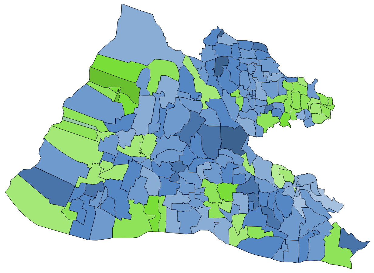 顏色對照表